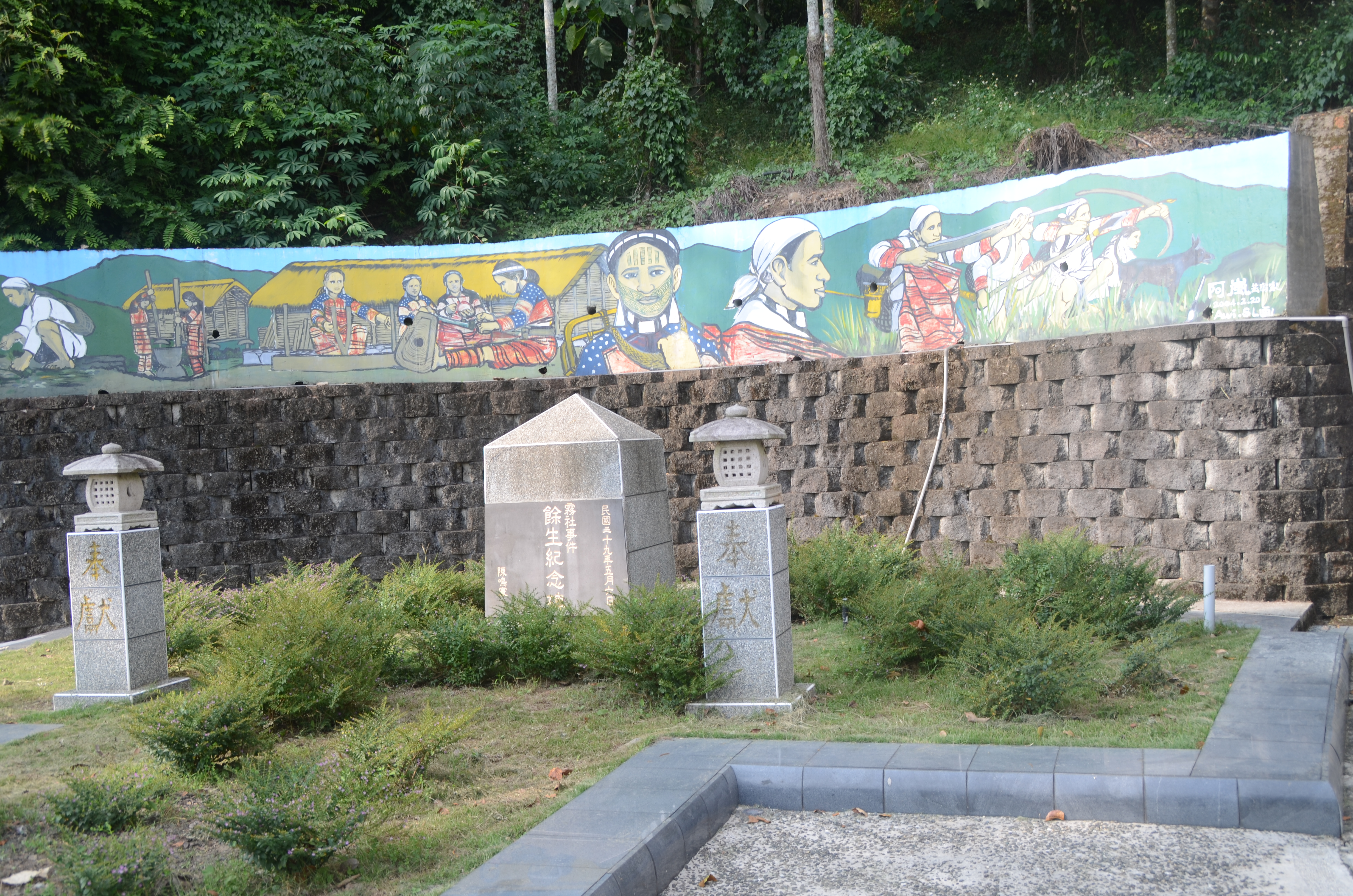 中文（台灣）: 霧社事件餘生紀念館用以紀念霧社事件的始末，與紀錄先民的遷徙歷史，於921後興建完成。